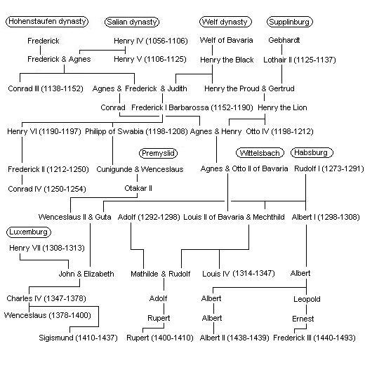 La dynastie Hohenstauffen